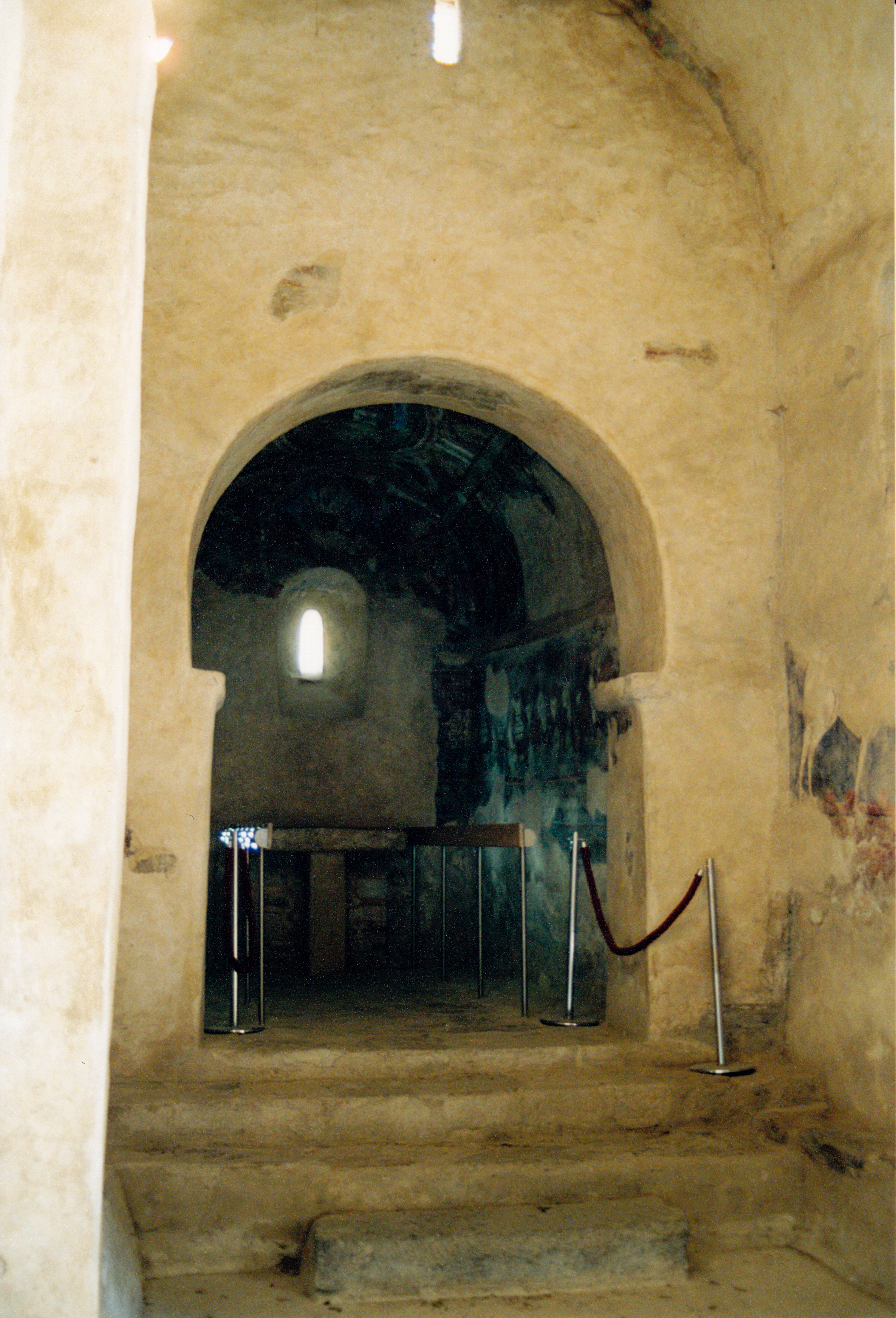 Roussillon - Fenollar - arc triomphal outrepassé